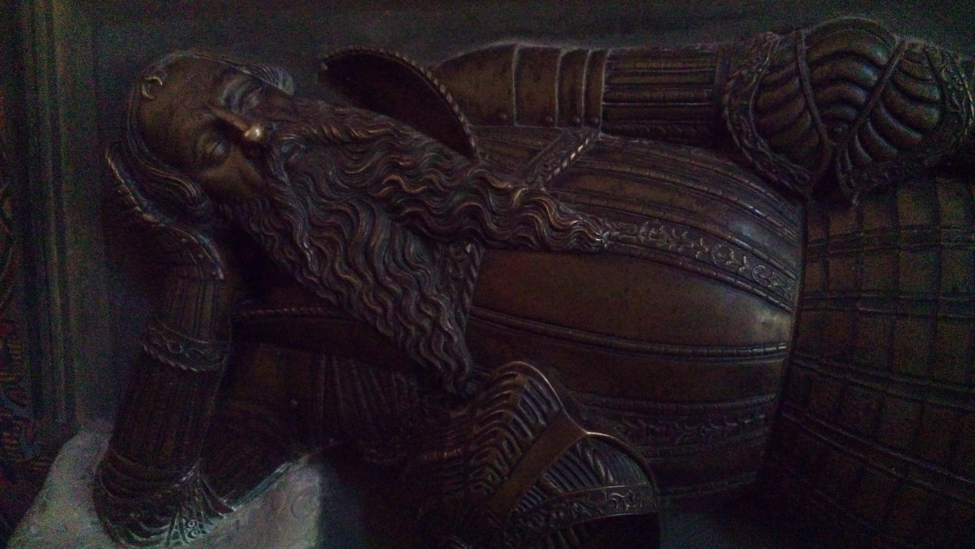 latin cathedral lviv